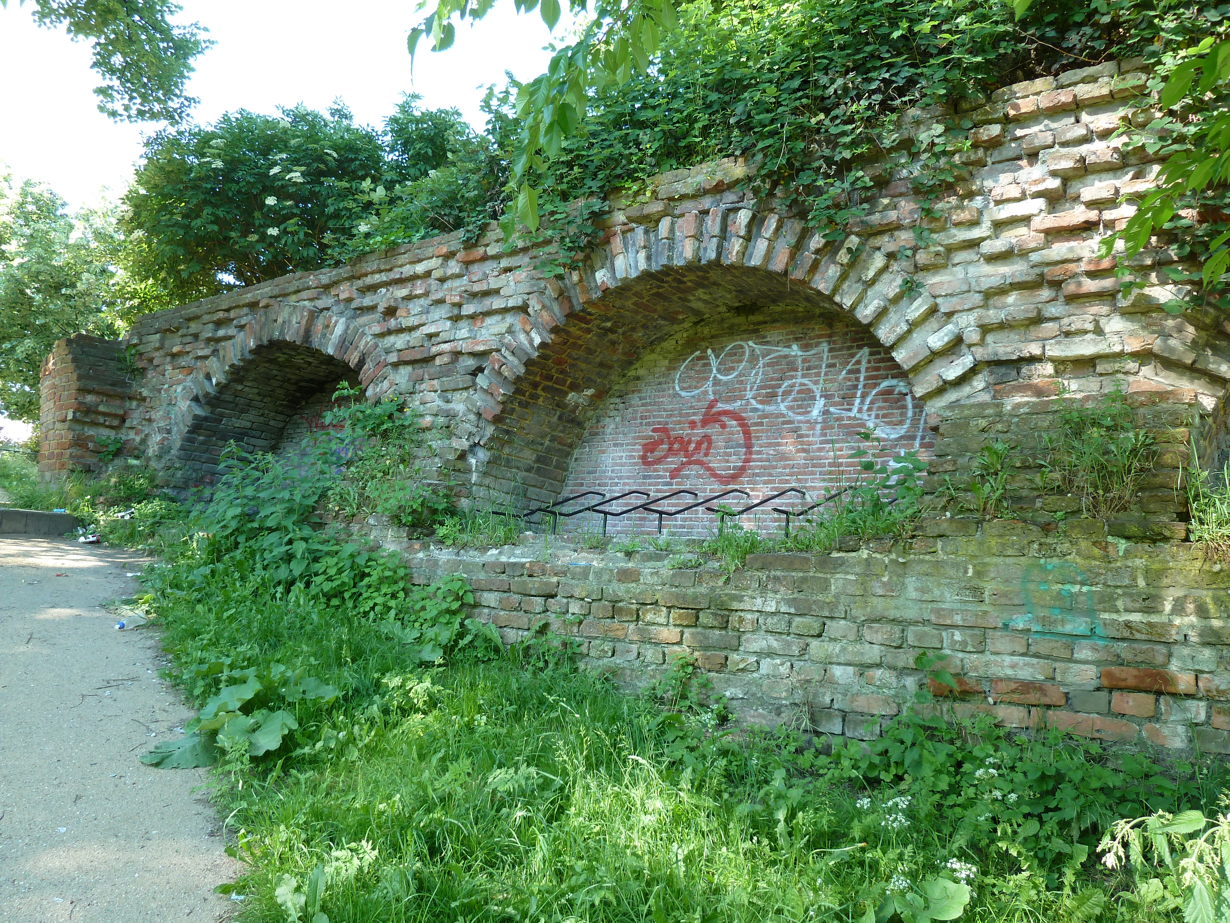 Restant van stadsmuur, bij Lucasbolwerk (Nobeldwarsstraat), Utrecht, NL. (Noot: dit betreft een "hersteld" deel, waarbij onjuist de zogeheten weergangsbogen aan de buitenzijde ipv de binnenzijde zijn aangebracht. Literatuur: L.C. van der Vlerk et al. (1983), Utrecht ommuurd, Kwadraat, Vianen, ISBN 9064812020, blz. 12)